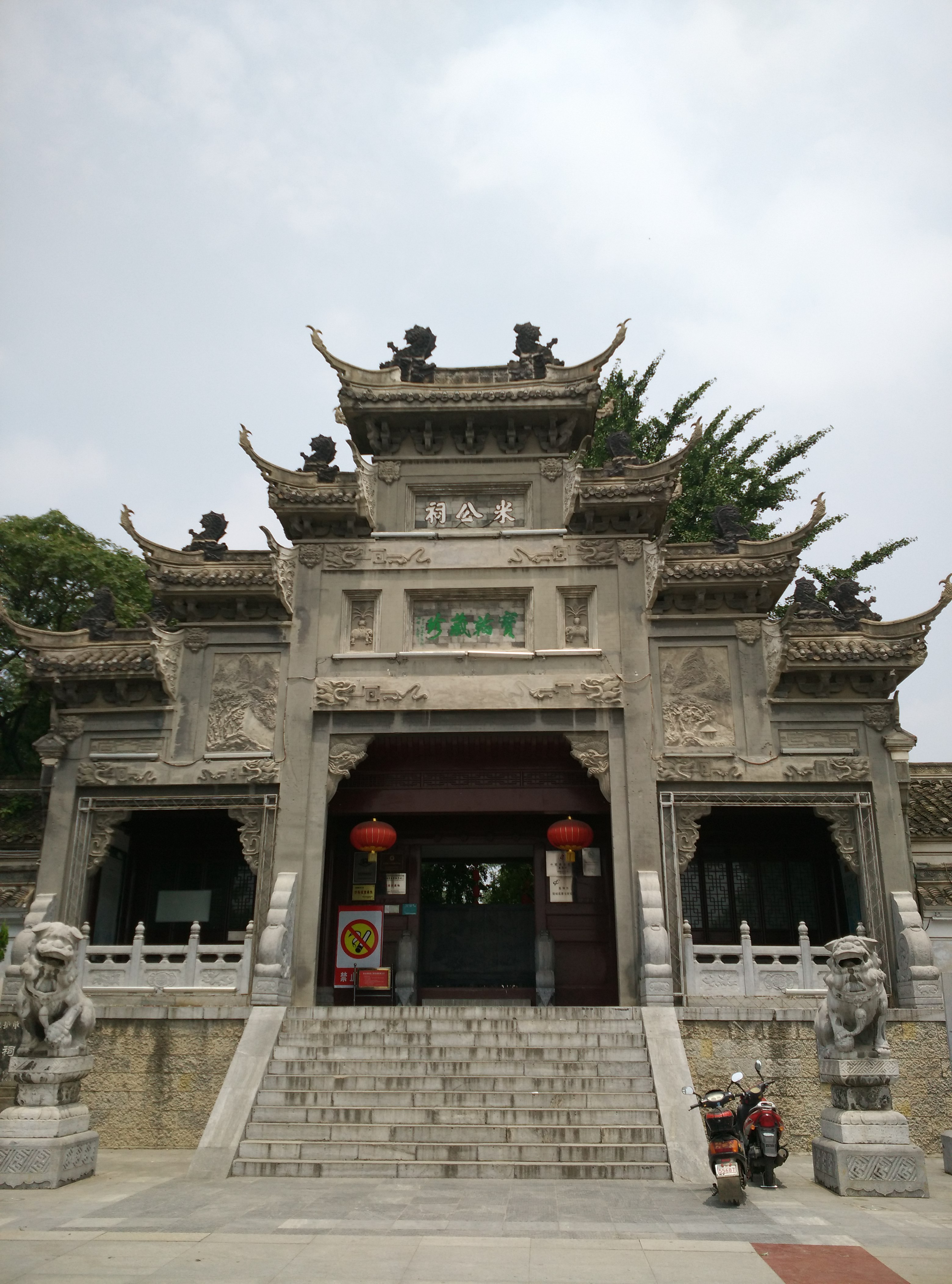 襄阳米公祠正门。